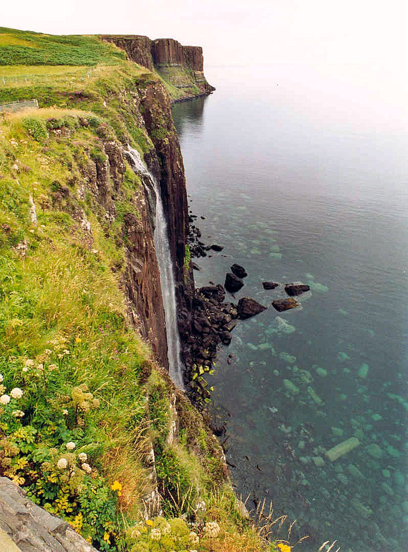 Schottland: Wasserfall am Kilt Rock auf Skye